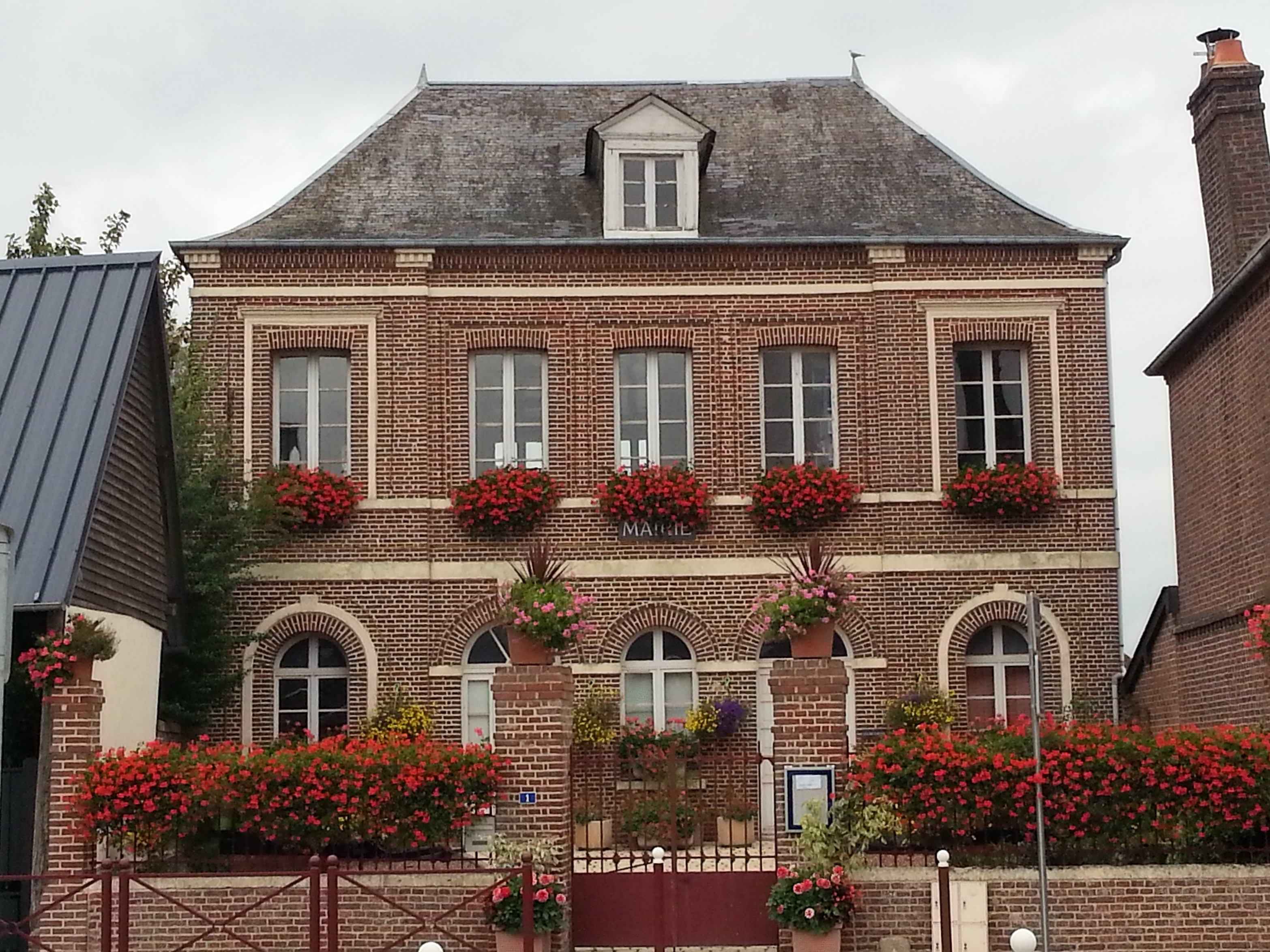 Mairie de Romescamps